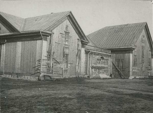 Lapuan työväenyhdistyksen talo laudoitettuna 1931. Kuvaaja tuntematon. Työväen Arkisto.